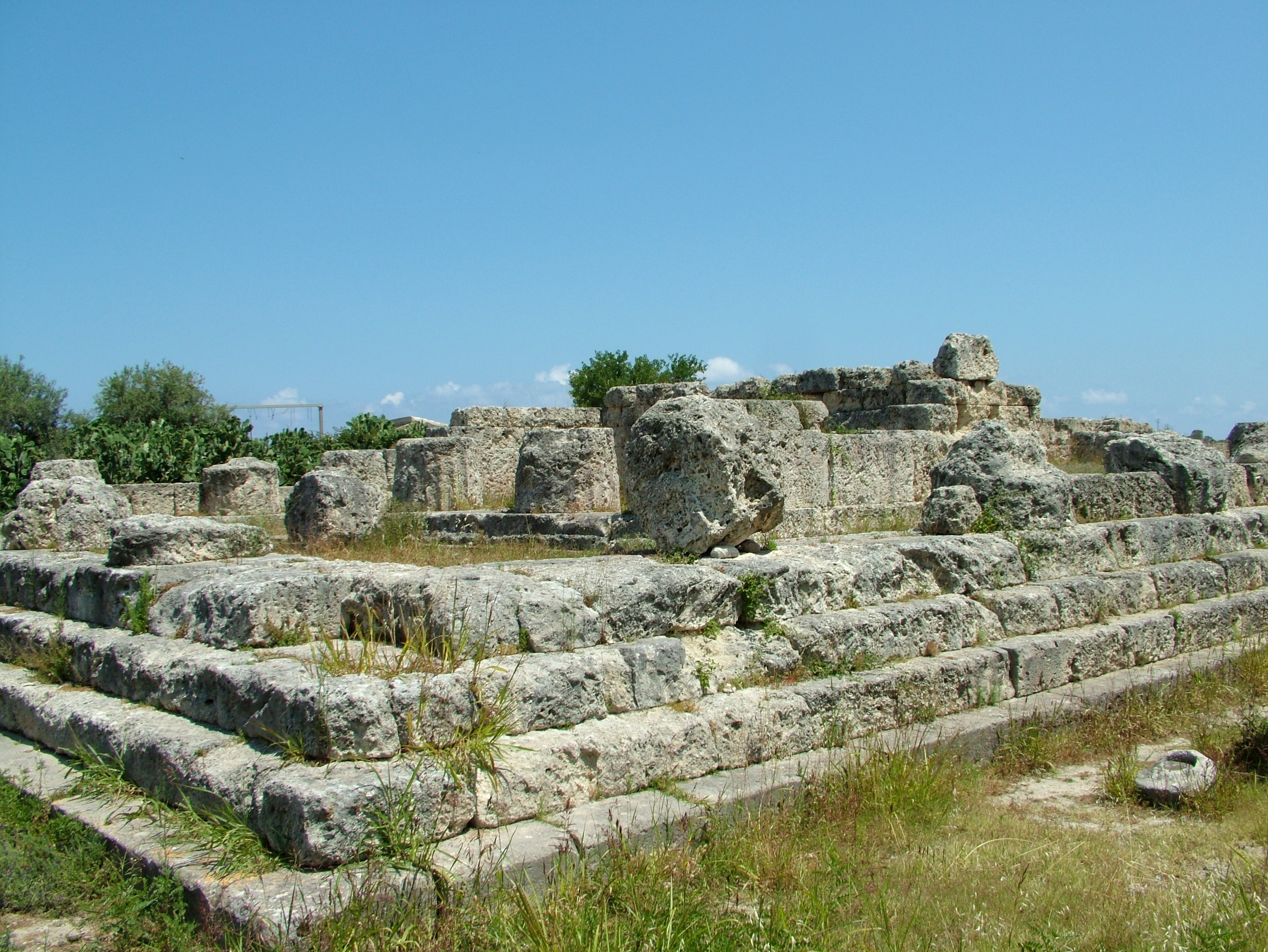 Himera, Sizilien, Viktoriatempel, Detail